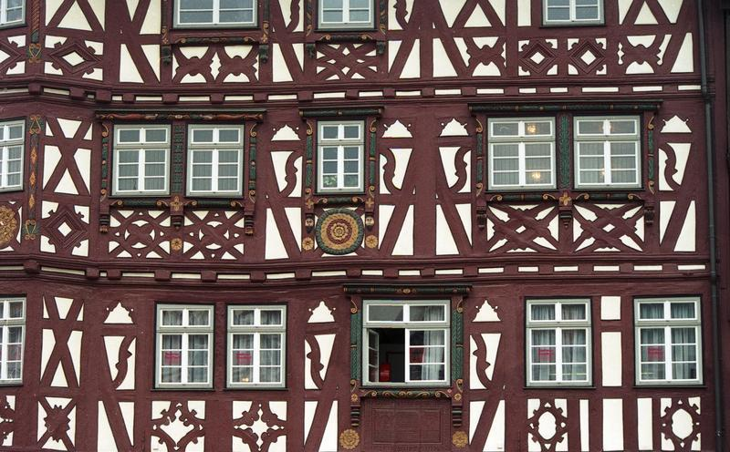 Juni 1988 Mosbach im Elztal